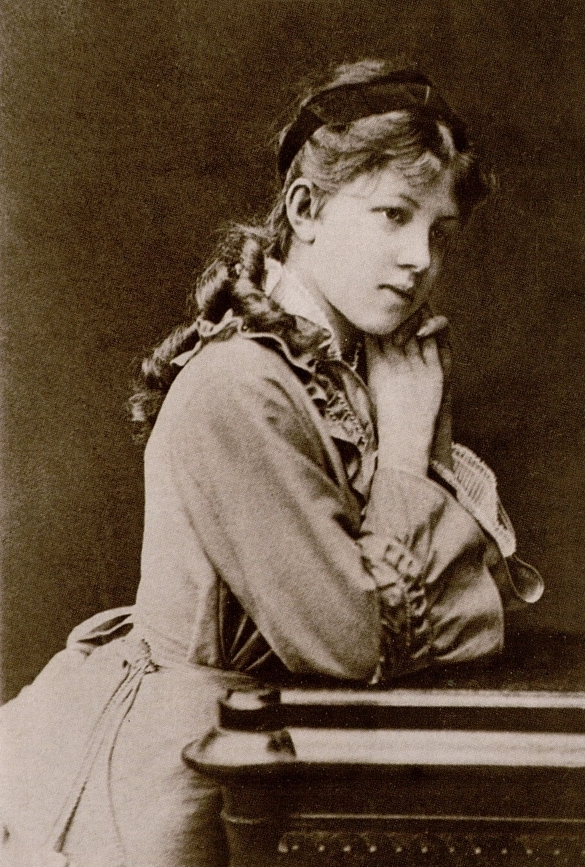 Александра Андреевна Блок (по второму мужу - Кублицкая-Пиоттух) - мать поэта А. Блока. Варшава, 1880.